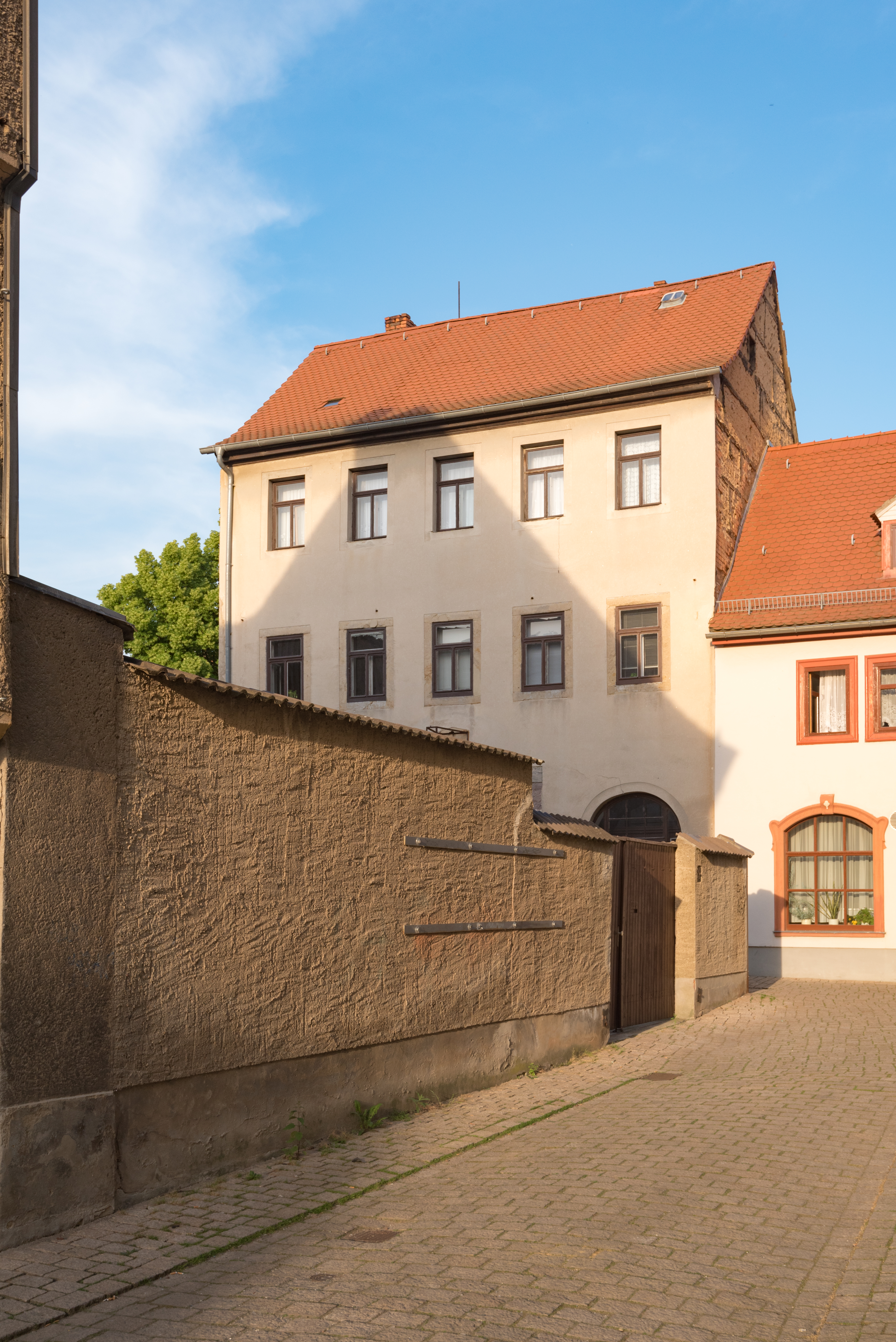 Naumburg (Saale), Wendenplan 3